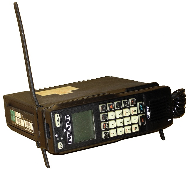 Premier telephone GSM Français